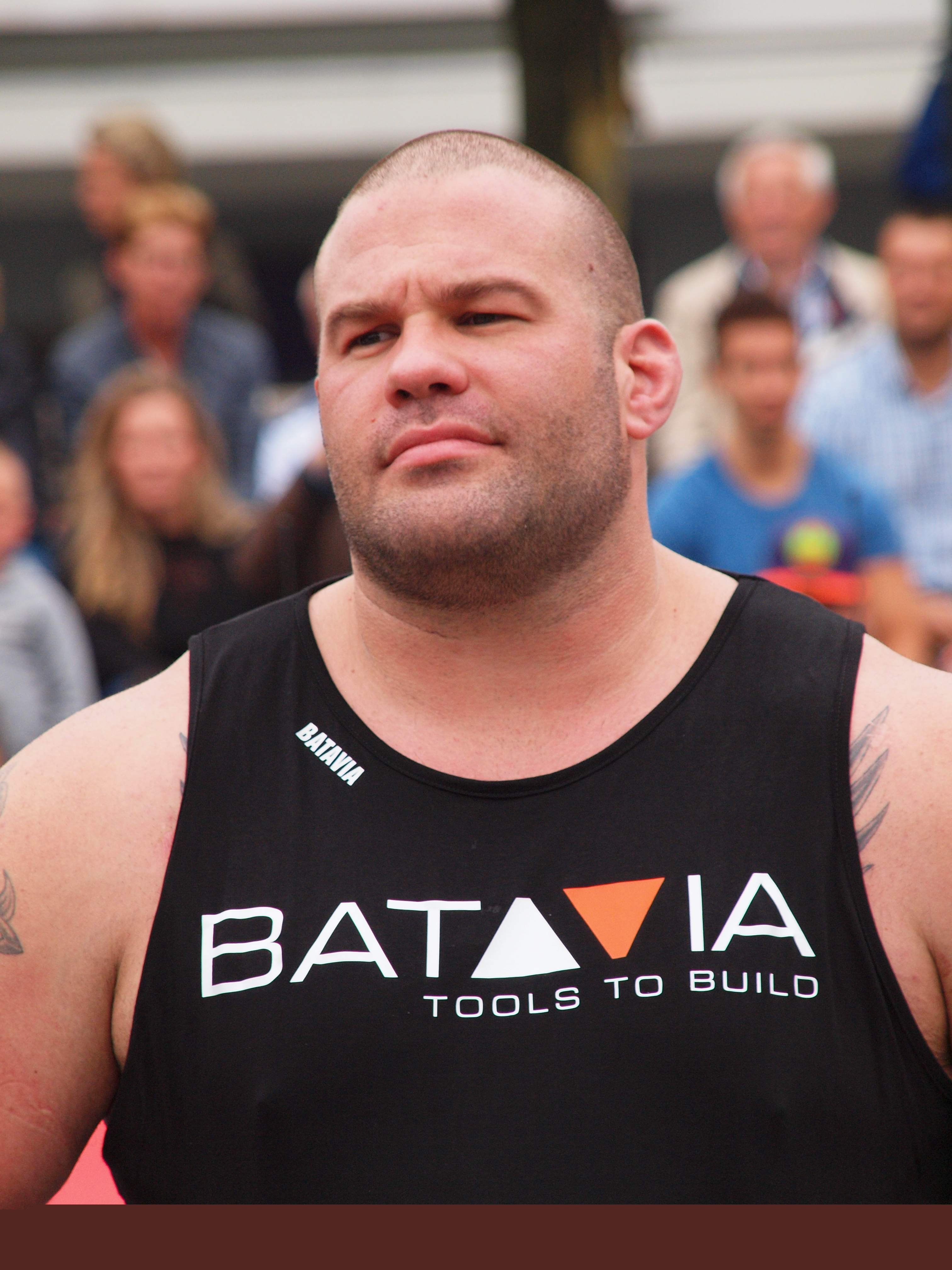 Alex Moonen, meervoudig Sterkste Man van Nederland en voormalig topjudoka bij Defensie (KNmar). In het dagelijks leven aardrijkskundeleraar. Deze foto: voorronde in Hengelo, voorjaar 2017